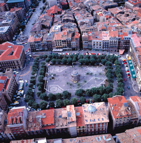 Mosaicos en la plaza